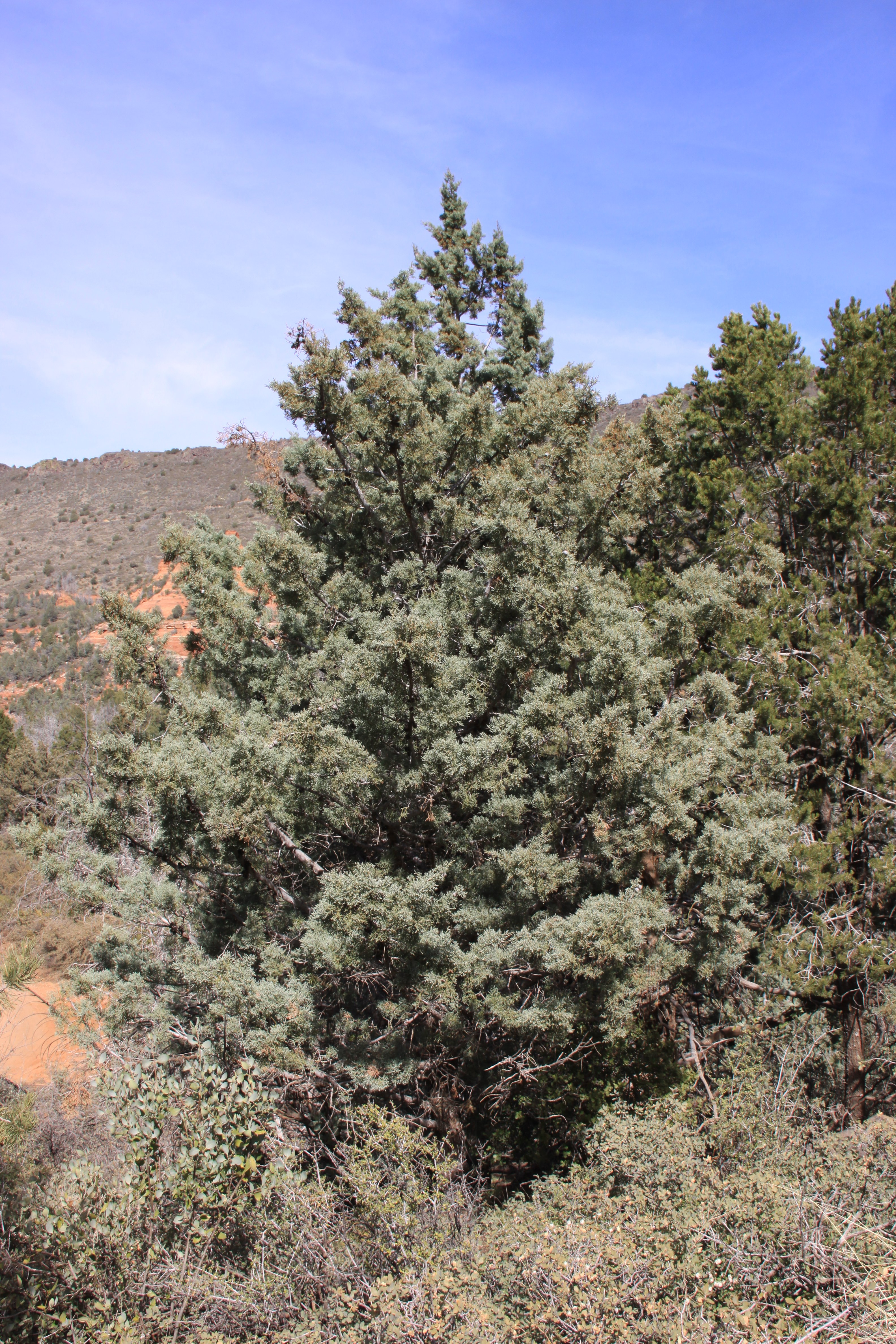 Cupressus glabra in Sedona, Arizona